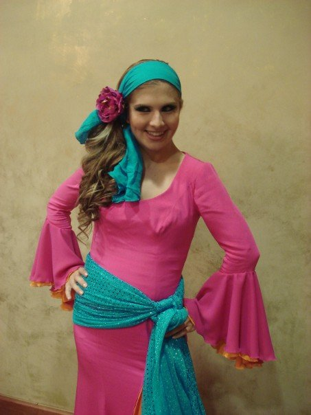 אלין לחוד